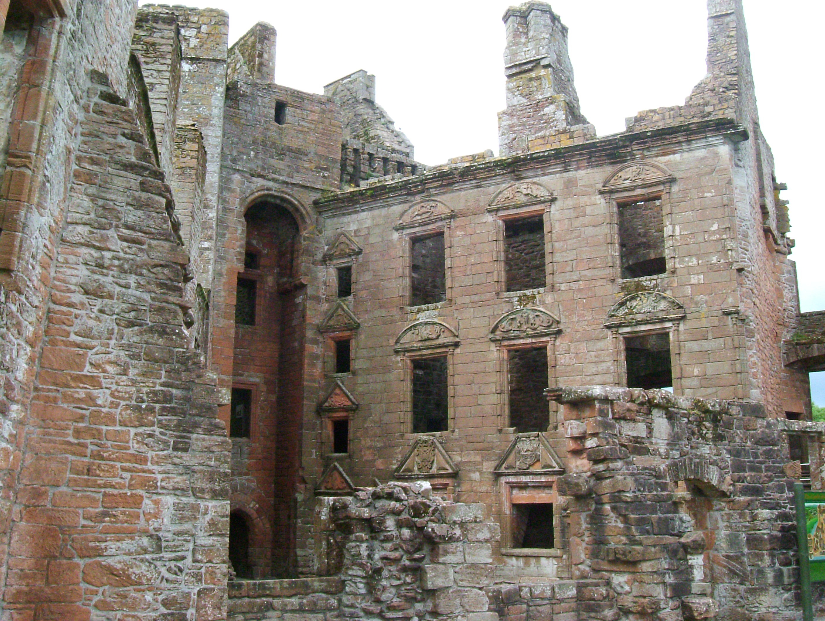 Caerlaverock Castle, Haupthaus – Nithsdale Lodging